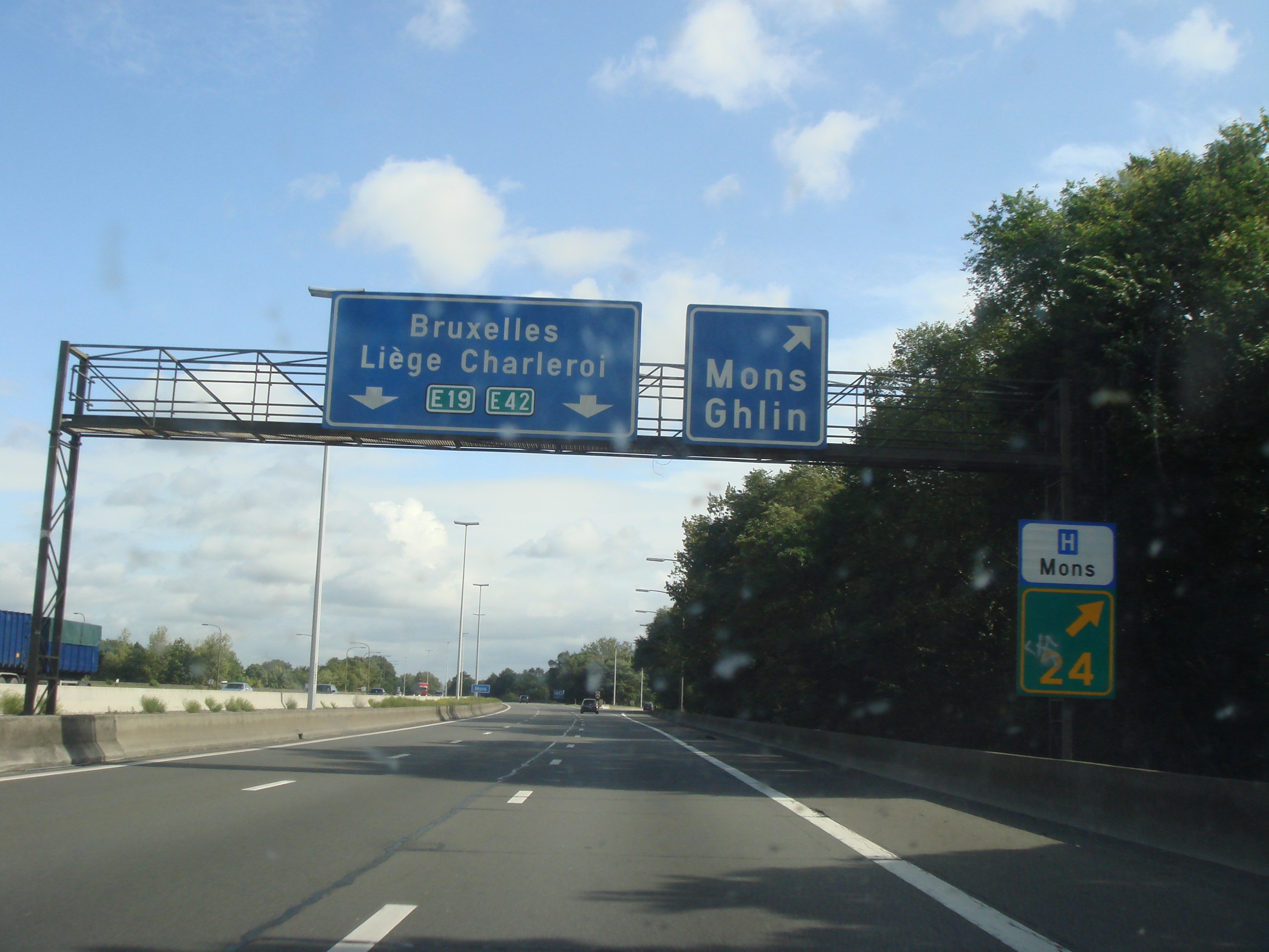 L'autoroute belge A7 au niveau de Mons et en direction de Bruxelles